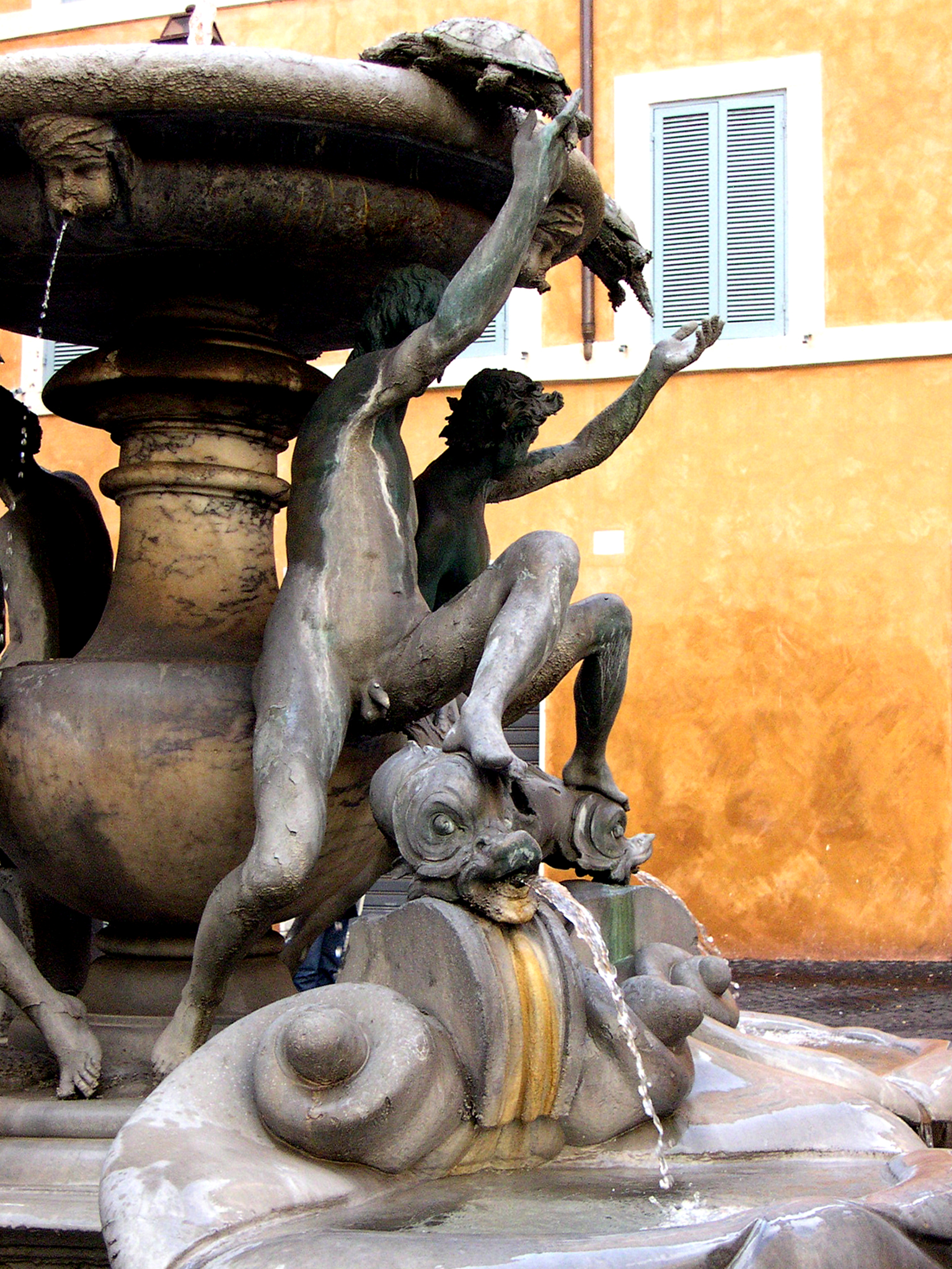 La fontaine des tortues, située Piazza Mattei à Rome.